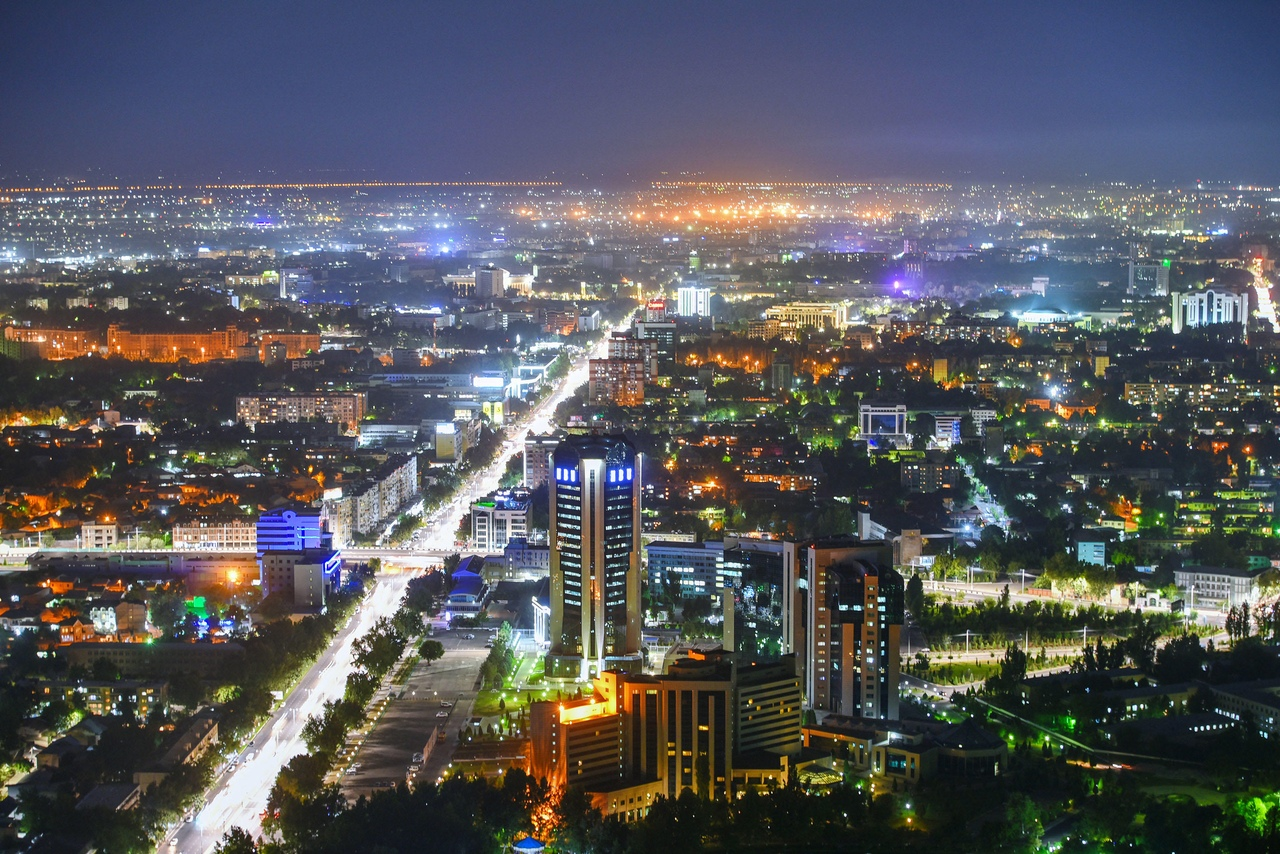 Ташкент 2019